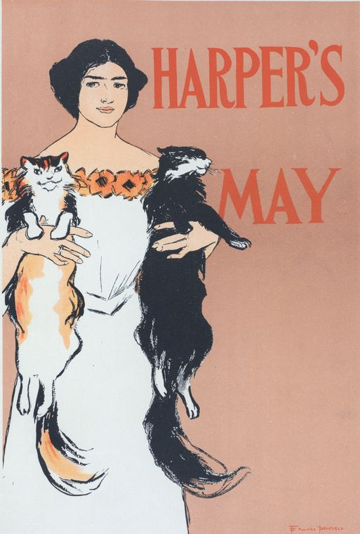 Affiche américaine pour la Revue "Harper's Magazine". Numéro de Mai 1897.